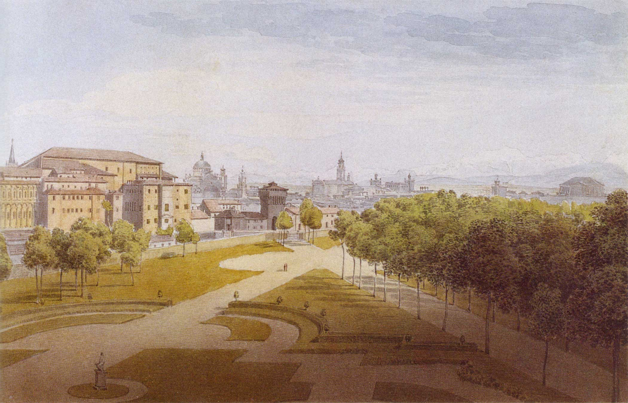 "Veduta di Parma", 1816: acquerello di Maria Luigia D'Austria, duchessa di Parma (1791 - 1847), con probabili aiuti. Museo Glauco Lombardi, Parma.